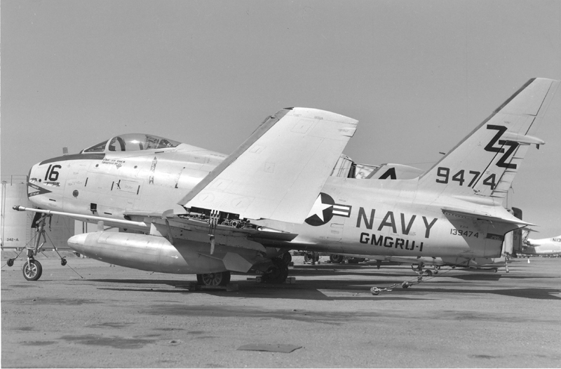 FJ-4zzAlameda copy.jpg